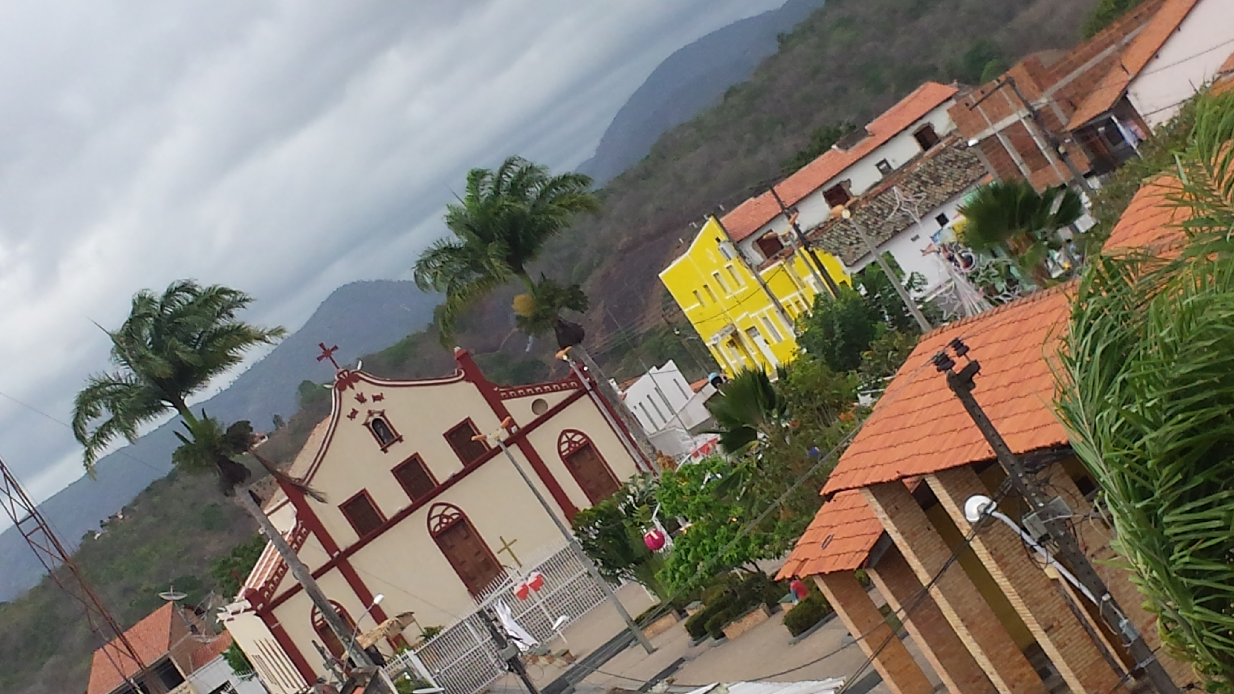 Cidade de Palmácia